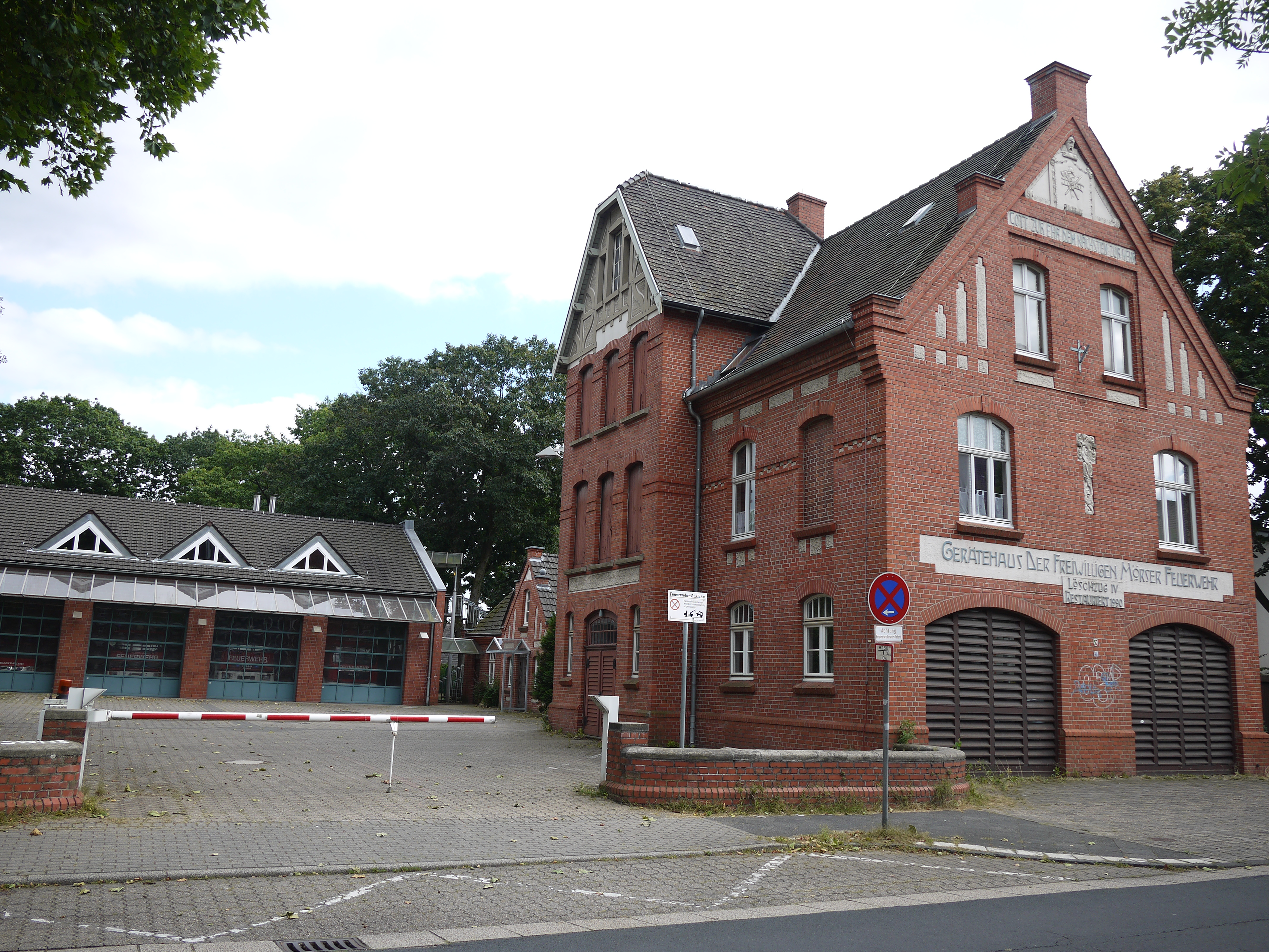 Moerser Heide, Gebäude der Freiwilligen Feuerwehr Scherpenberg in Moers, denkmalgeschützt